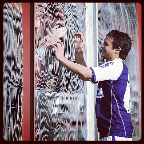 Festejando la final